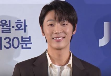 jtbc 월화 드라마 '으라차차 와이키키2' 제작발표회가 25일 오후 서울 여의도 콘래드서울에서 열렸다.